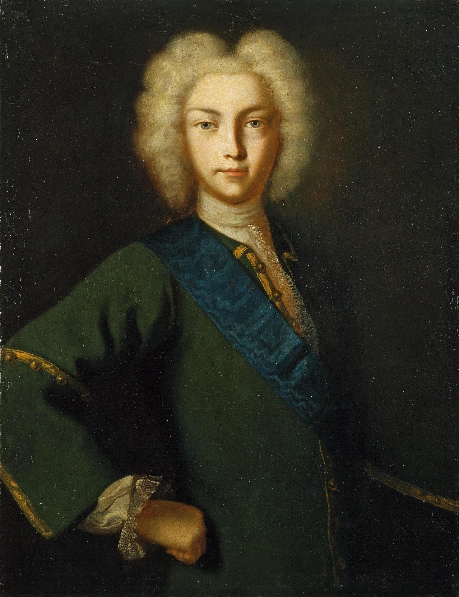 Неизвестный художник Портрет Петра II Россия, XVIII в. холст, масло Размеры: 103х80 см Инвентарный номер: ЭРЖ-550